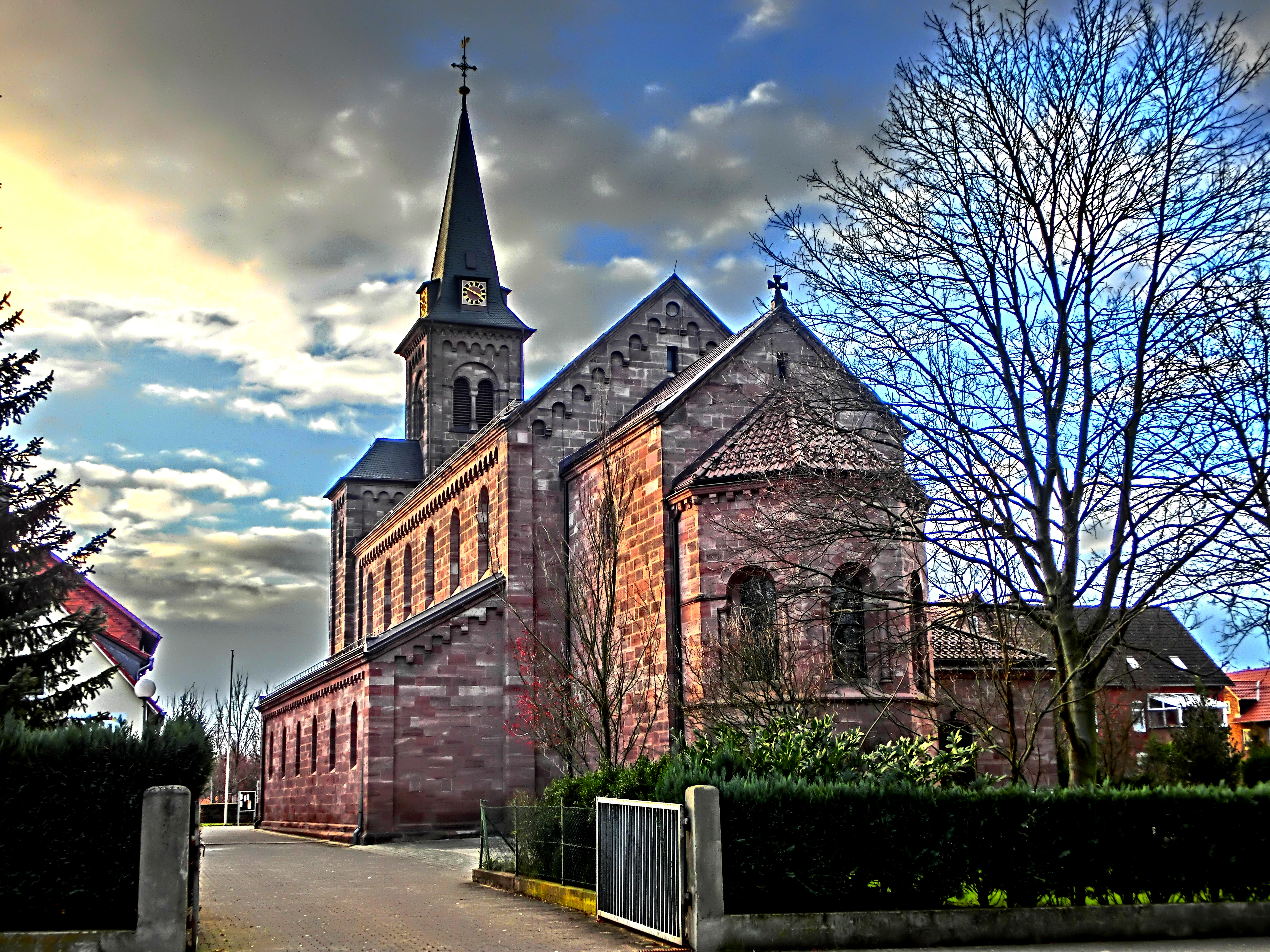 Die katholische Pfarrkirche Mariä Heimsuchung, umgangssprachlich auch kurz Marienkirche genannt, ist ein neuromanisches Gotteshaus in der niedersächsischen Kreisstadt Northeim. Die 1885/86 nach Plänen von Richard Herzig erbaut.